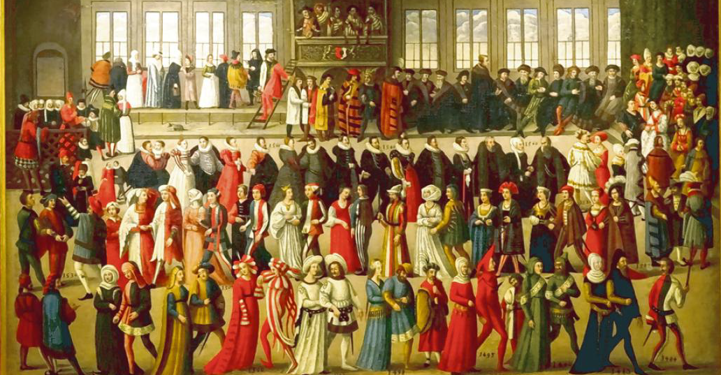 Geschlechtertanz im Obergeschoss des Tanzhauses in Augsburg aus dem Jahre 1560